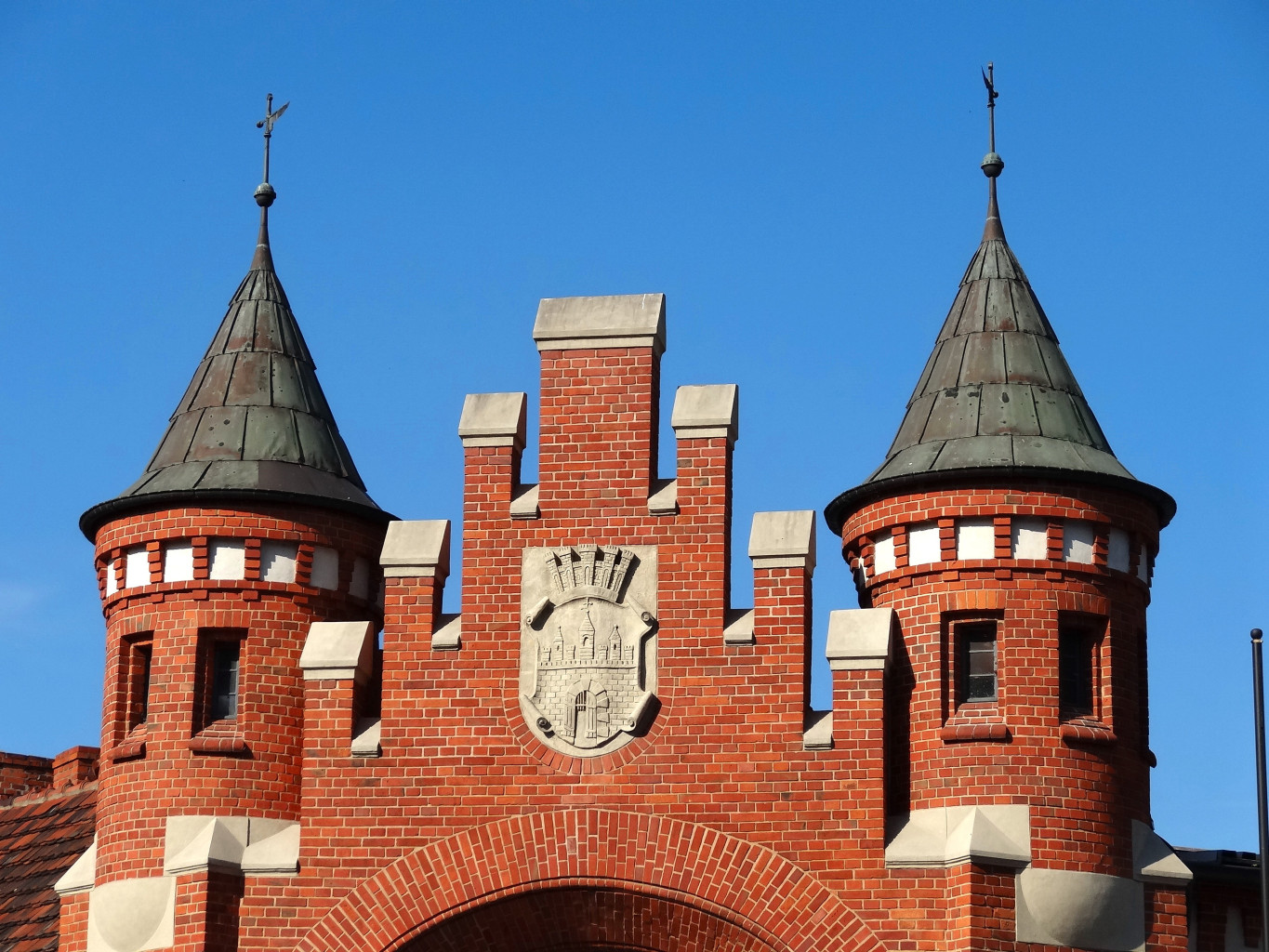 Miejska hala targowa w Bydgoszczy przy ul. Podwale zbud. 1906 r